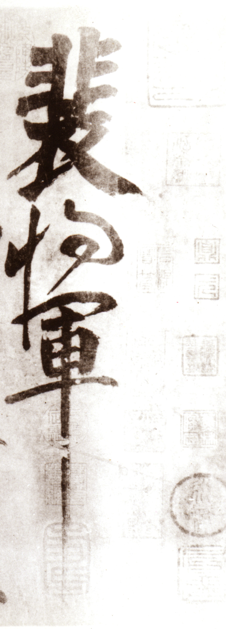 墨跡